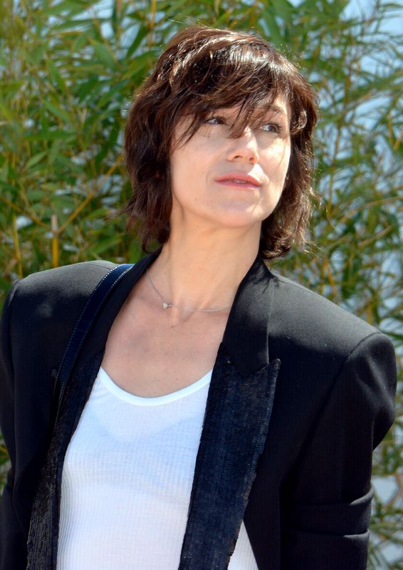 Charlotte Gainsbourg au festival de Cannes